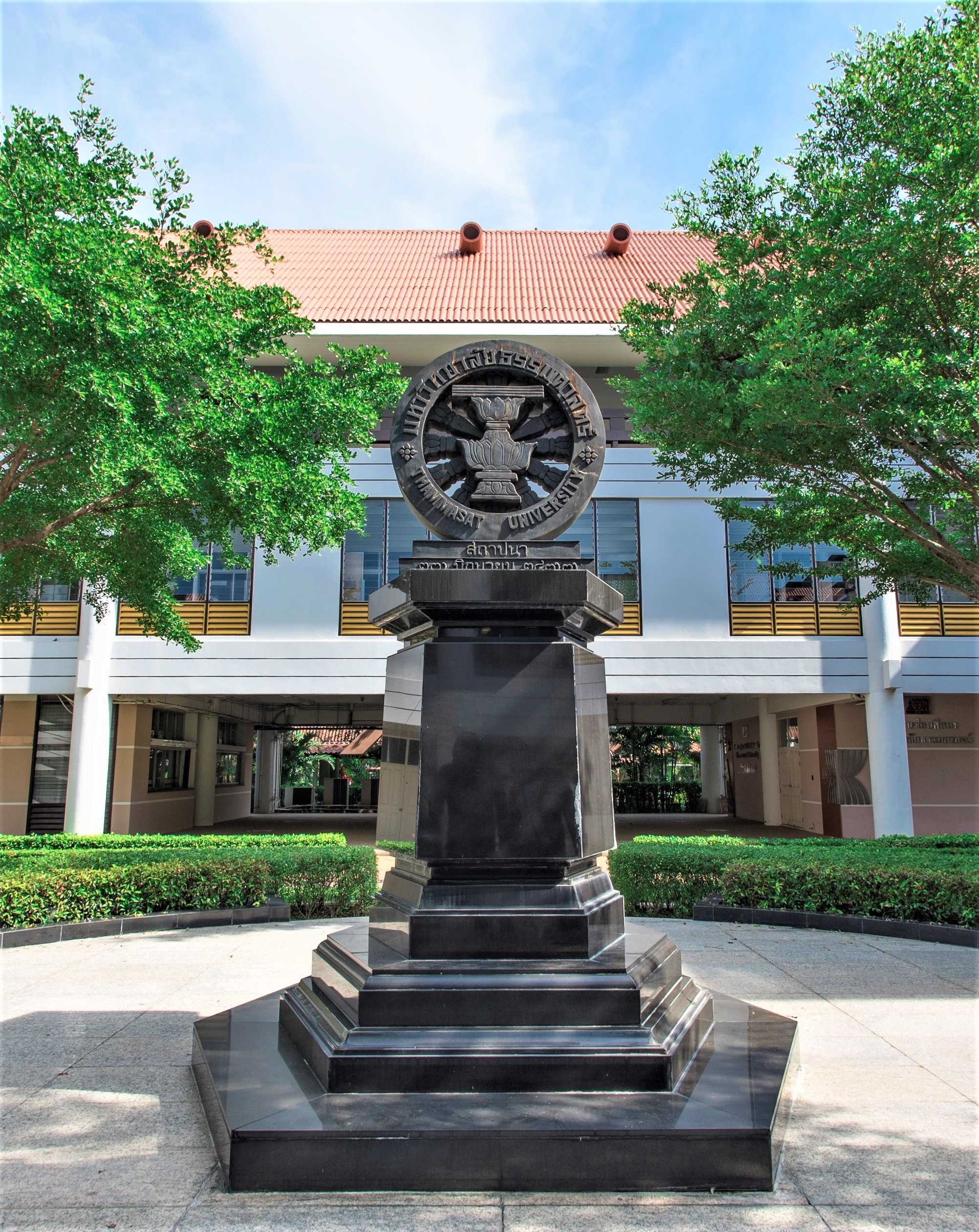 ธรรมจักร สัญลักษณ์ประจำมหาวิทยาลัยธรรมศาสตร์